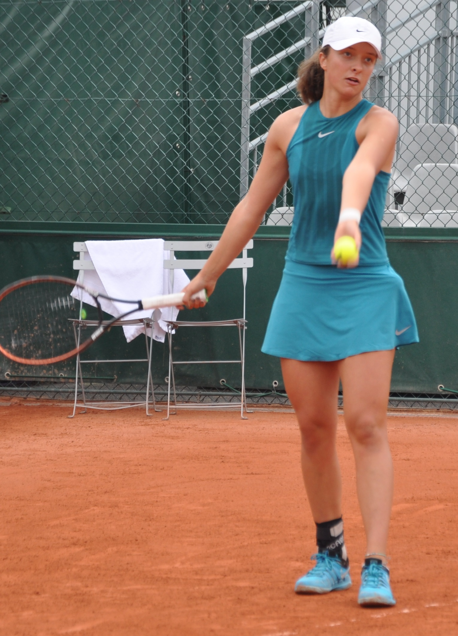 Iga Świątek, dans le tableau junior de Roland Garros 2018